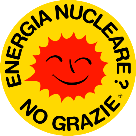 Símbolo tradicional de la oposición a la construcción de centrales nucleares. Otra versión del símbolo antinuclear. La mejor es Nucleares_no_gracias.svg, ya que es una versión vectorial editable de la que se ha derivado esta.